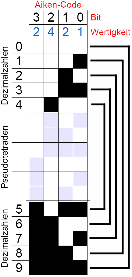 4-Bit Aiken Codetafel mit Symmetriebezug